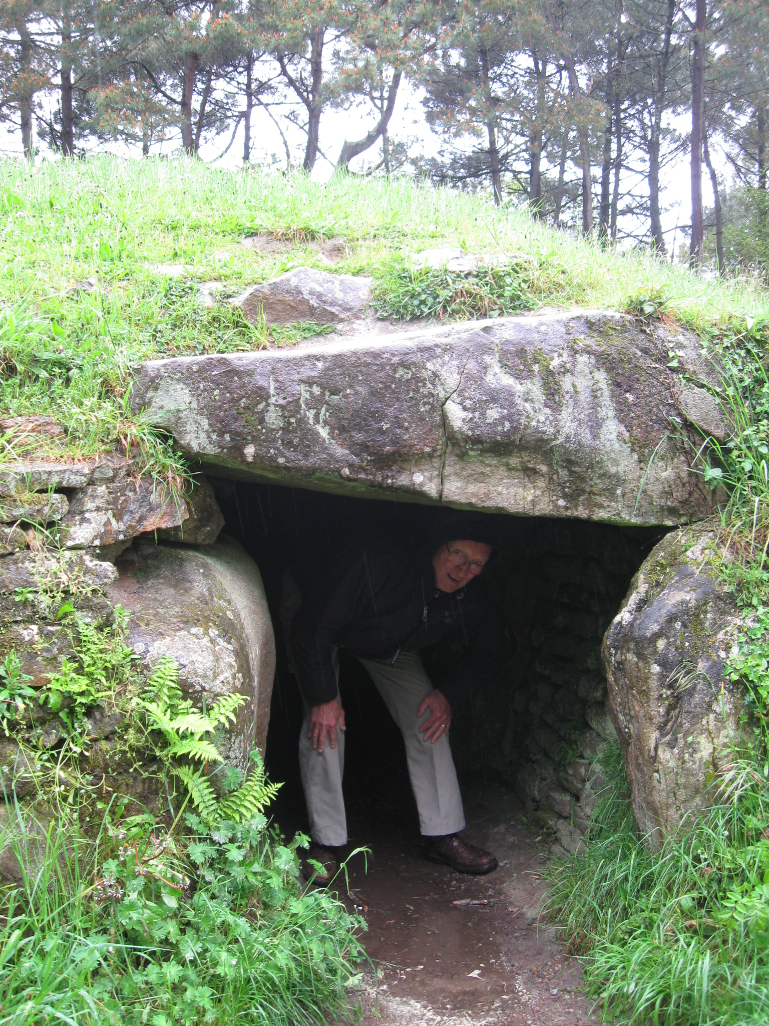 Dolmenzugang von Kernours